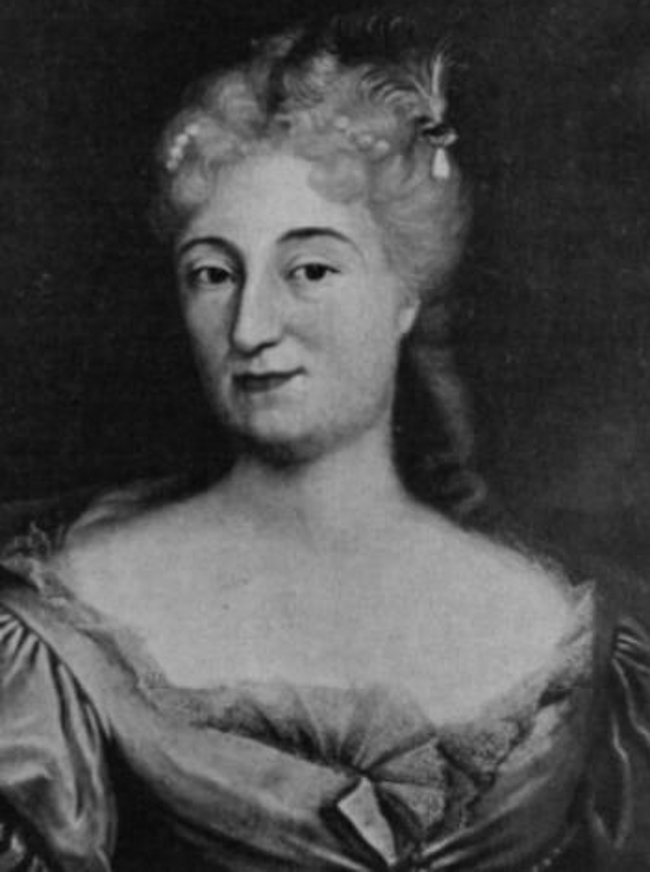 Portrait de Anne Charlotte de Cumiane (1680-1769), marquise de Spigno, épouse morganatique de Victor Amédée II, roi de Sardaigne